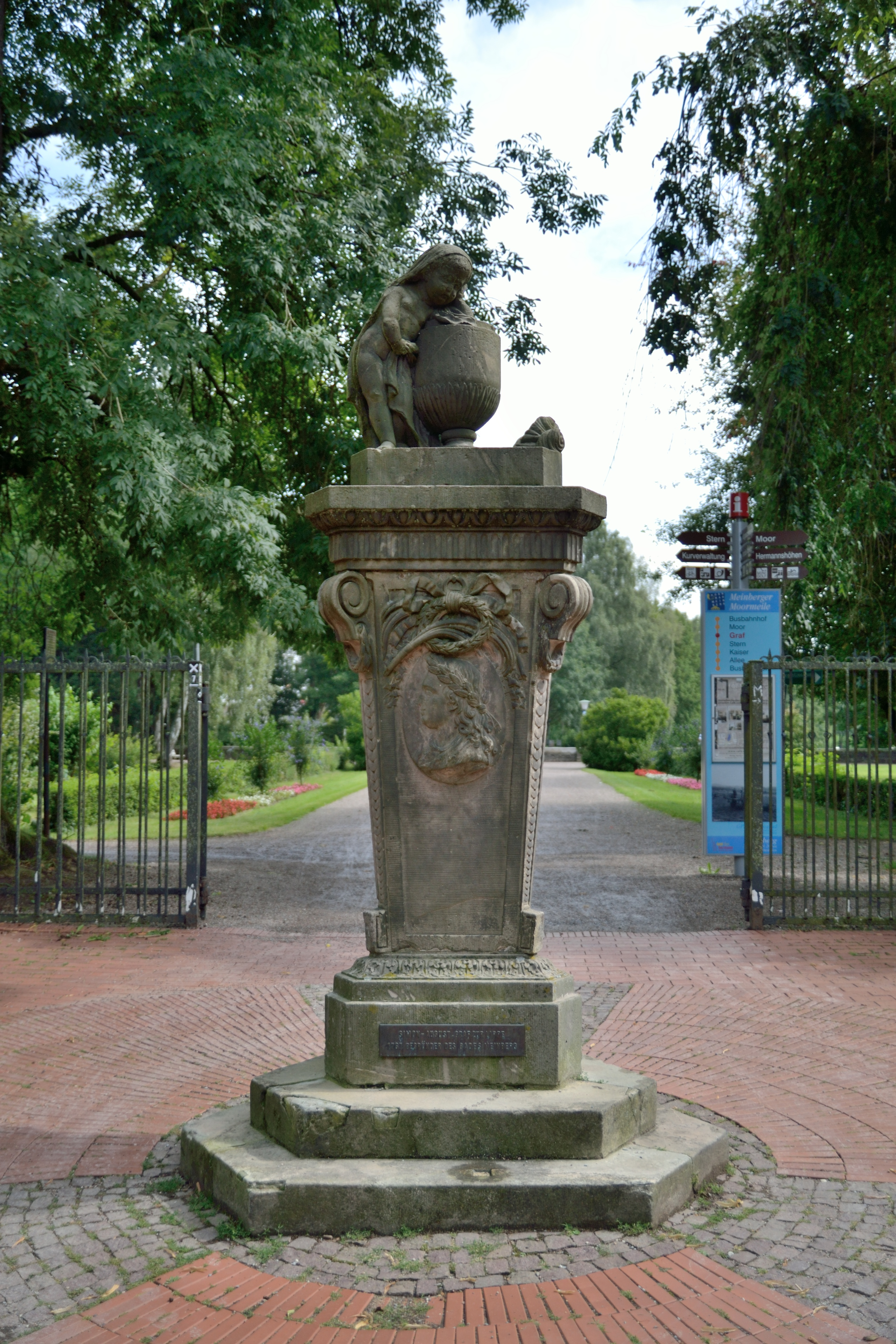 This is a photograph of an architectural monument. .10 Denkmal für Graf Simon August zur Lippe